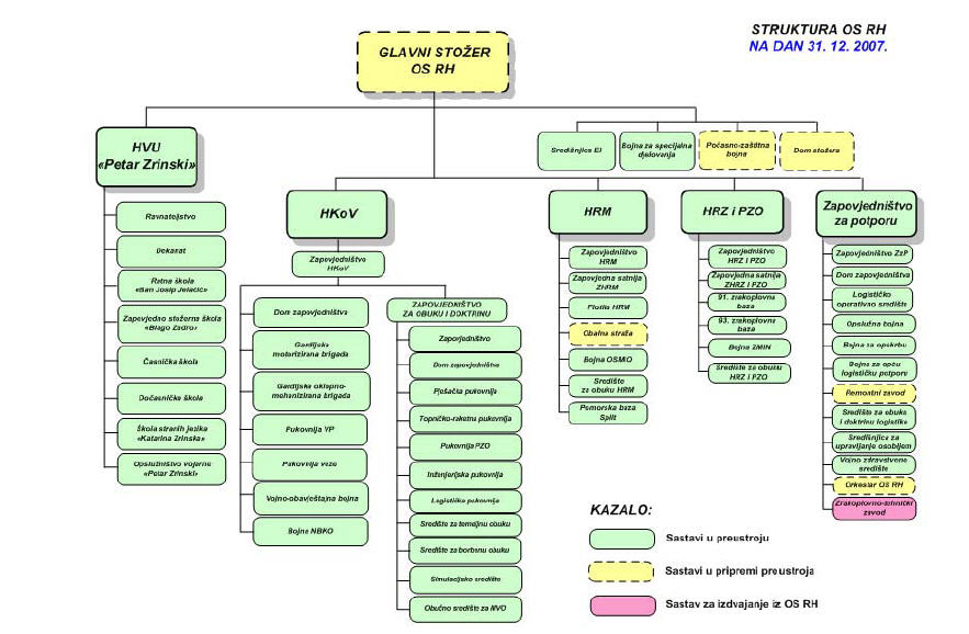 Organizacijska struktura Oružanih snaga Republike Hrvatske